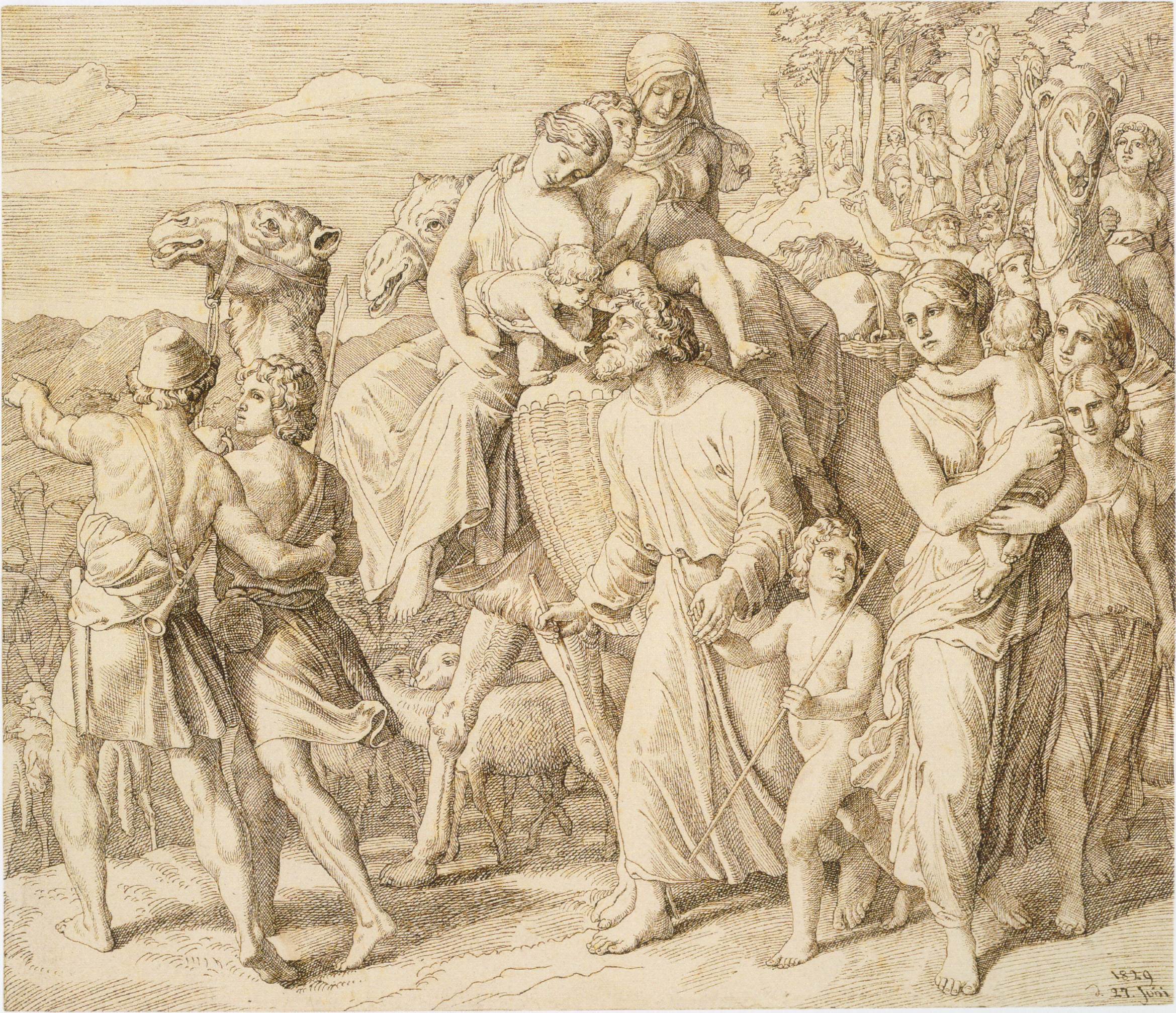 Jakobs Flucht, 1829